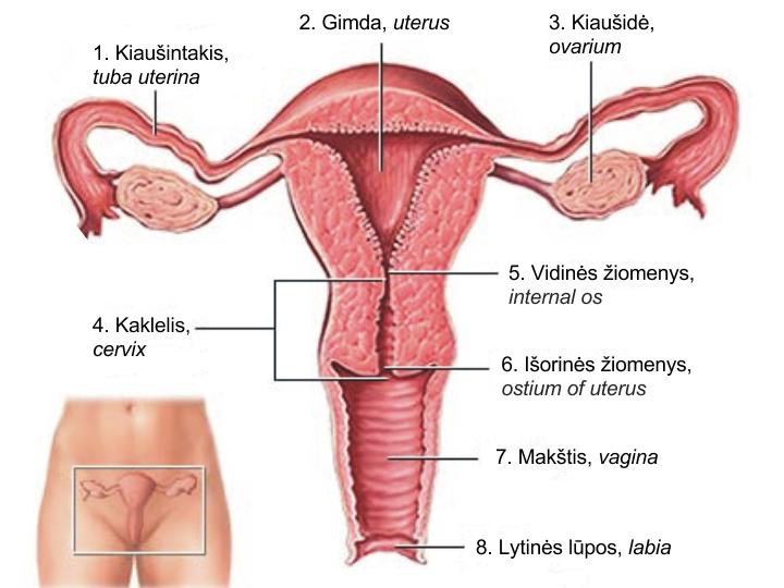 1.Kiaušintakis 2.Gimda 3.Kiaušidė 4.Kaklelis 5.Vidinės žiomenys 6.Išorinės žiomenys 7.Makštis 8.Lytinės lūpos